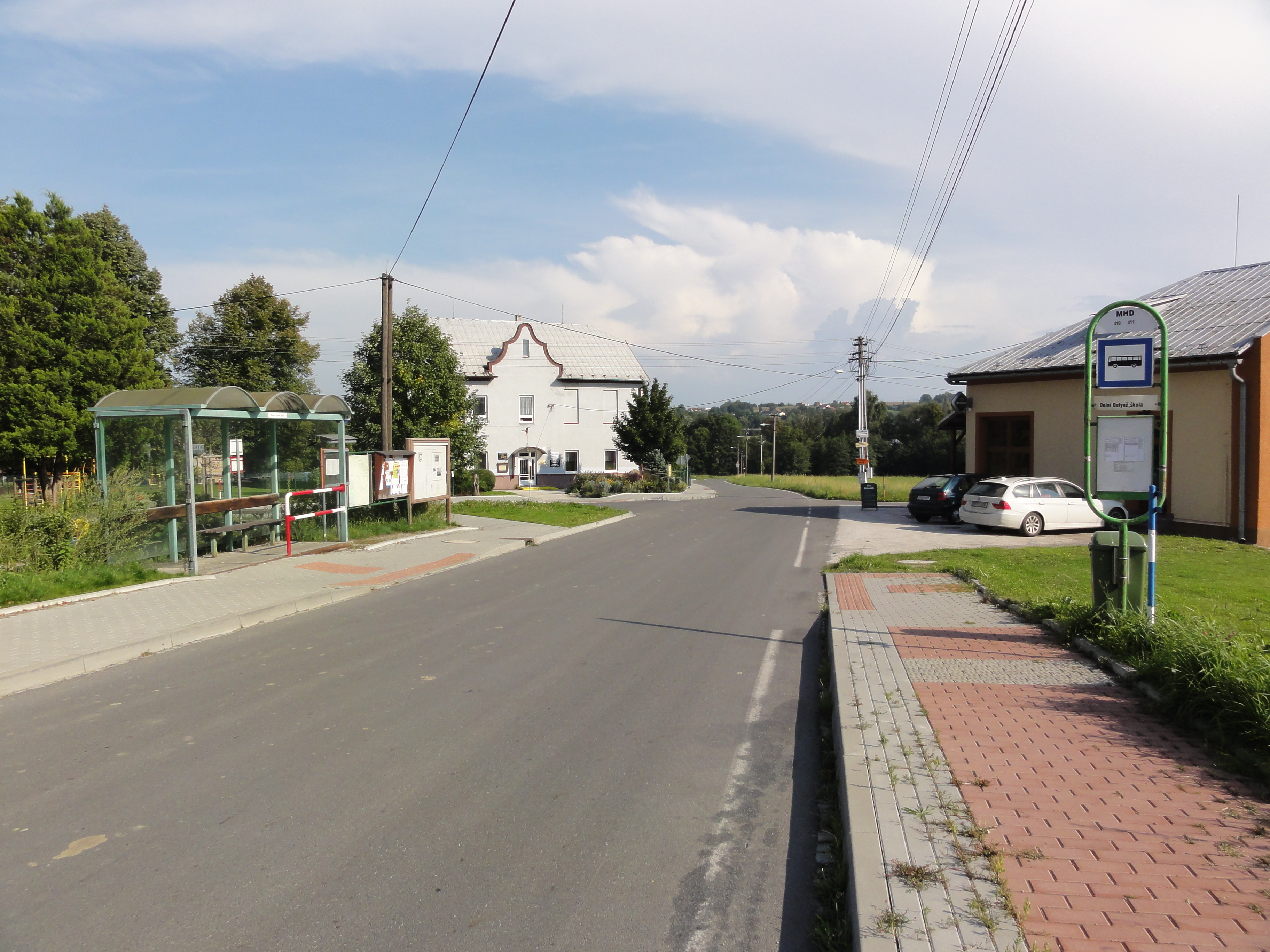 Datynie Dolne, przy szkole